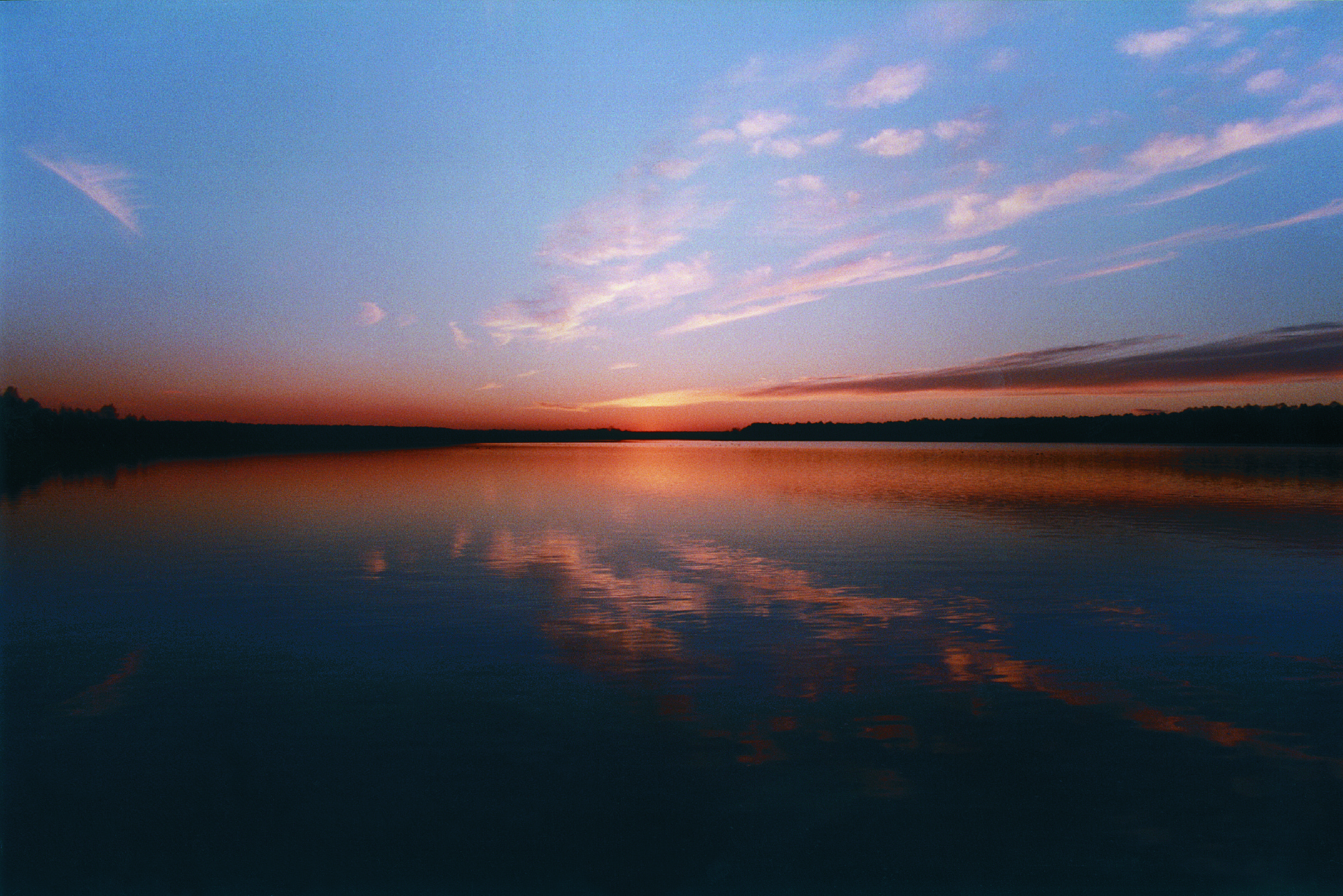 Tychy Jezioro Paprocańskie 1 fotografię wykonał tyski artysta fotografik